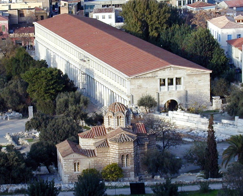 Stoa d'Attale vue des pentes nord de l'Acropole d'Athènes.